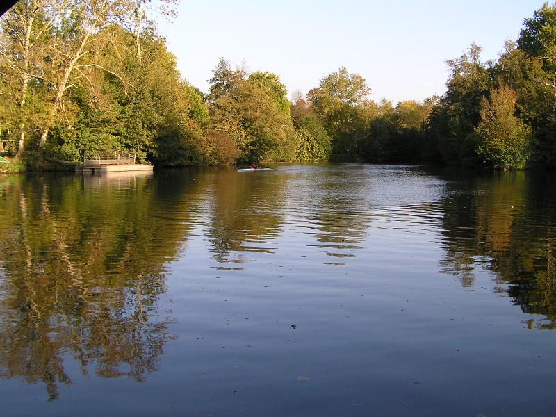 Fleuve Charente en amont de Cognac